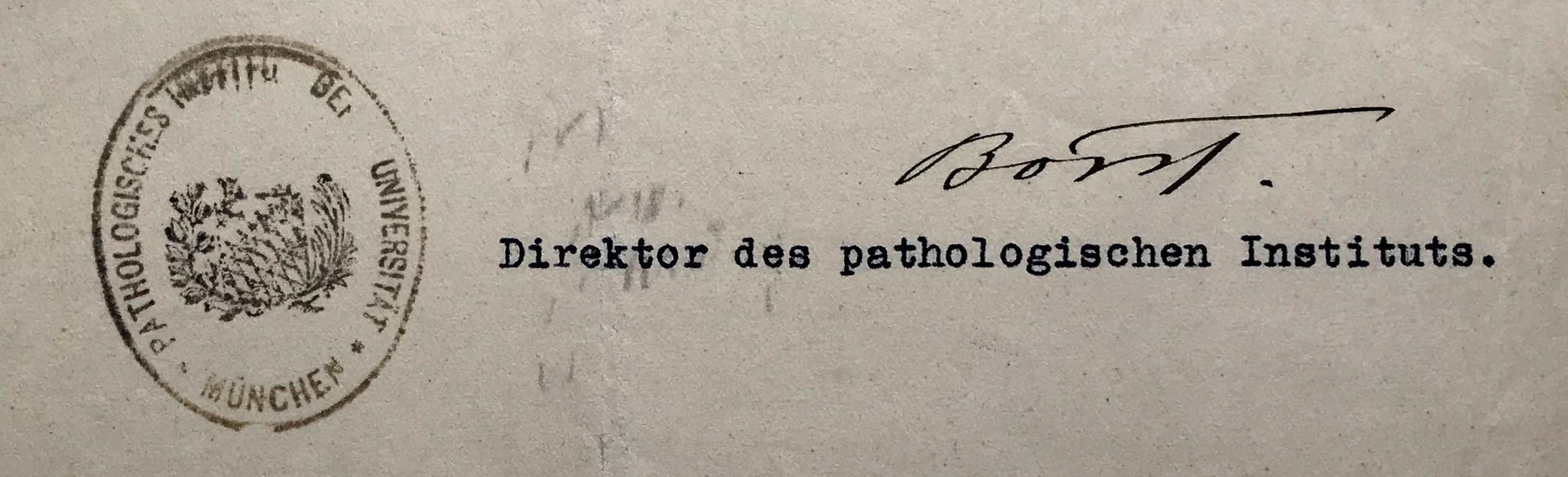 Unterschrift von Max Borst auf einem Dokument. Abfotografiert vom Original.